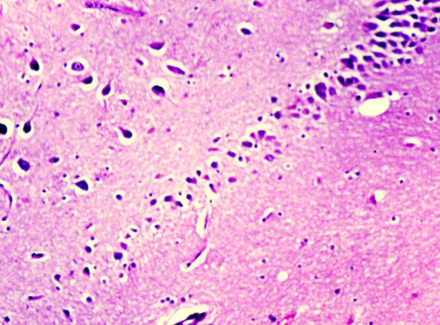 Cèl·lules del gyrus dentatus de l´hipocamp. Microscopi òptic. 350X. Tinció: H&E.